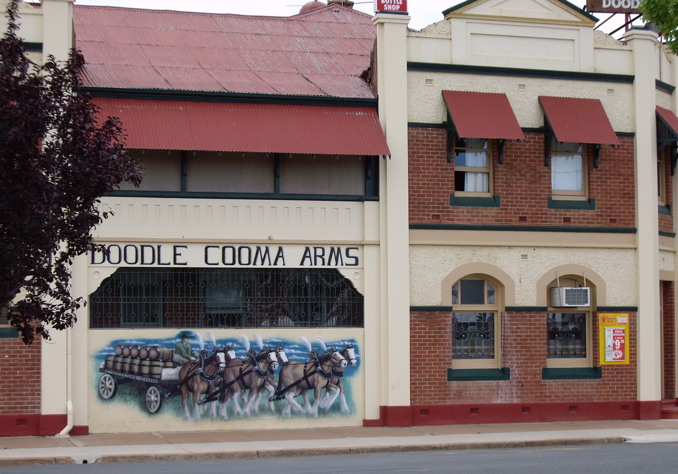 Doodle Cooma Arms Hotel - Henty